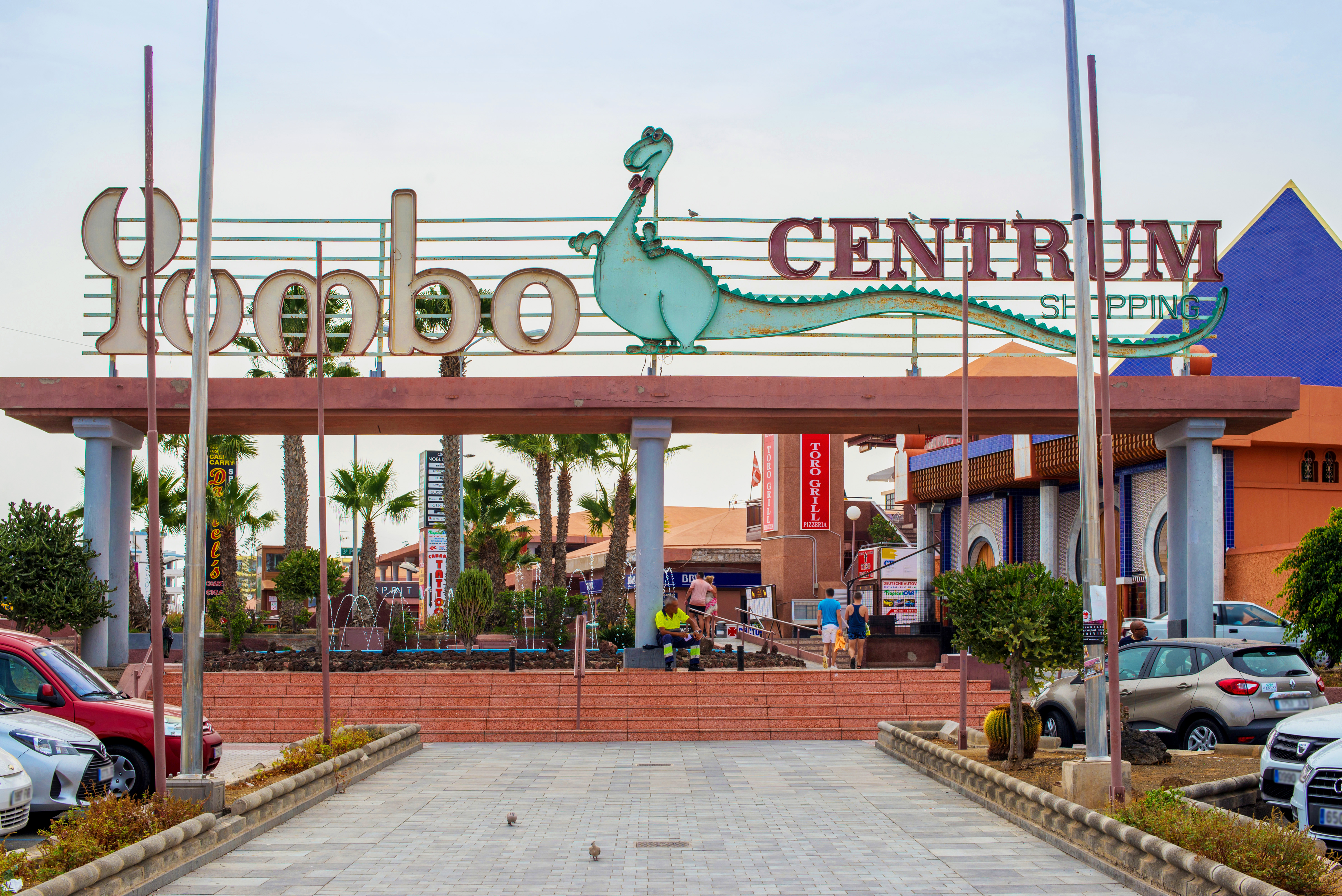 Playa del Inglés - Centro Comercial Yumbo Centrum